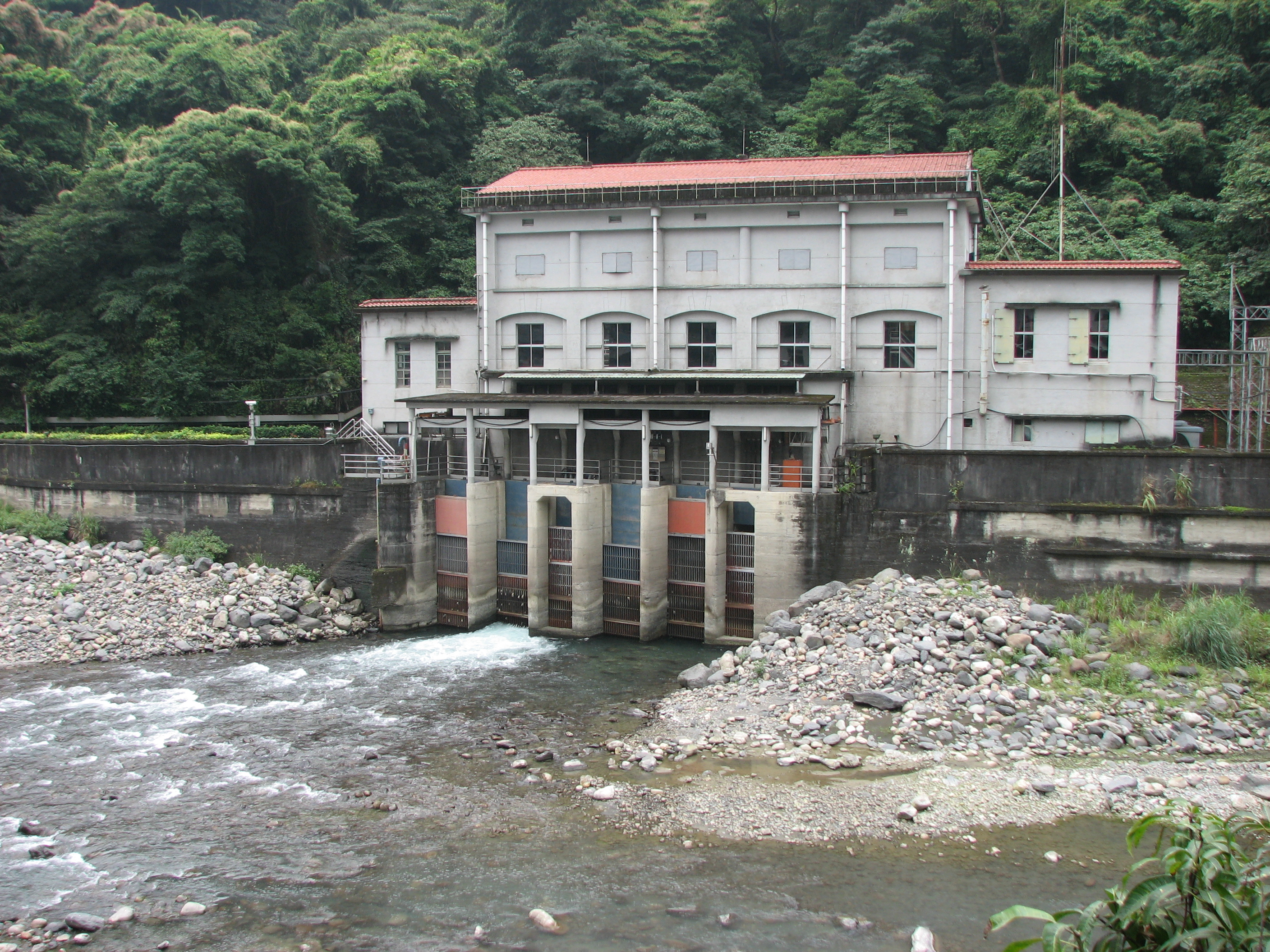 烏來發電廠